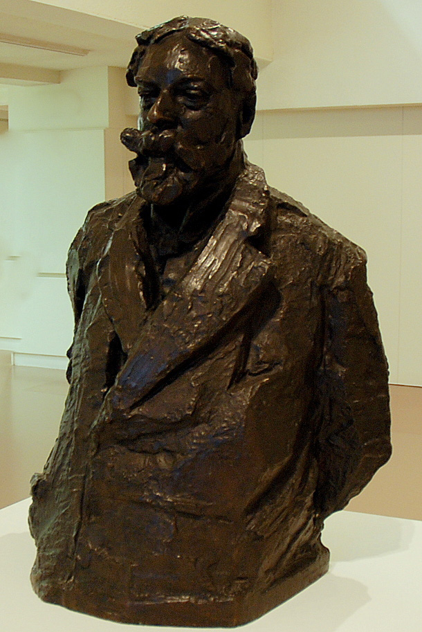 Rik Wouters - buste van James Ensor in het Kunstmuseum aan Zee te Oostende, België